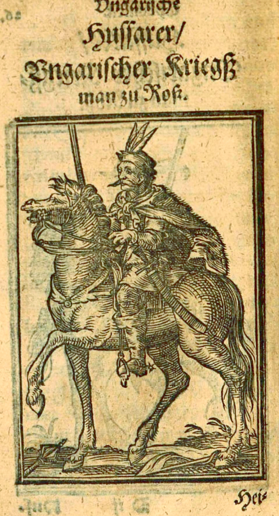 Magyar huszár a XVI.-ik században Illusztráció: Ungarische Chronica: Darinnen ordentliche, eigentliche und kurtze Beschreibung des Ober- unnd Nider-Ungern, sampt seinen Landtafeln und vieler furnehmer Festungen und Stedte Abriß